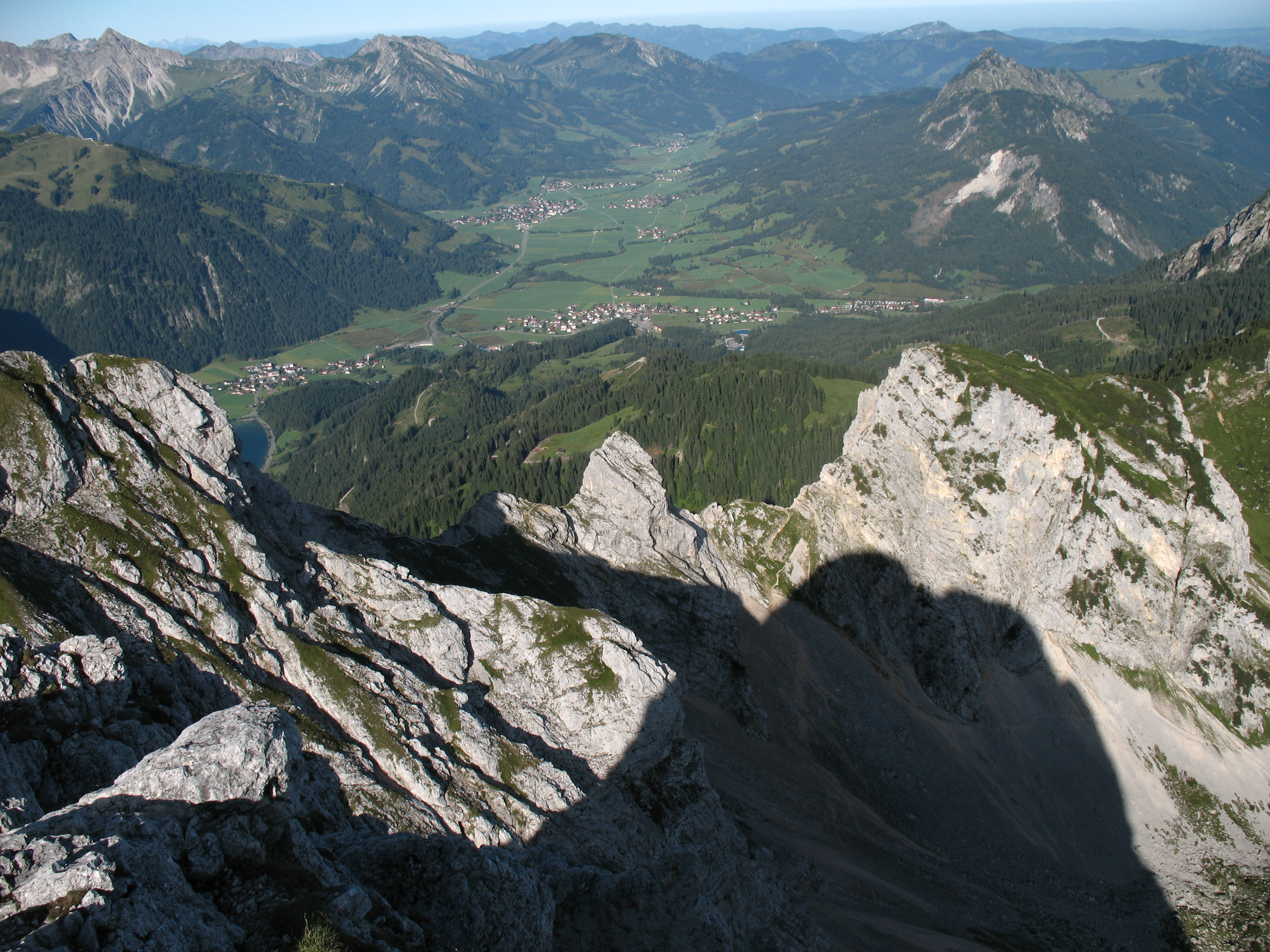 Das Tannheimer Tal aus Osten vom Gipfel des Gimpel (2173 m): Haldensee und die Orte Haldensee, Grän, Tannheim sowie Zöblen.